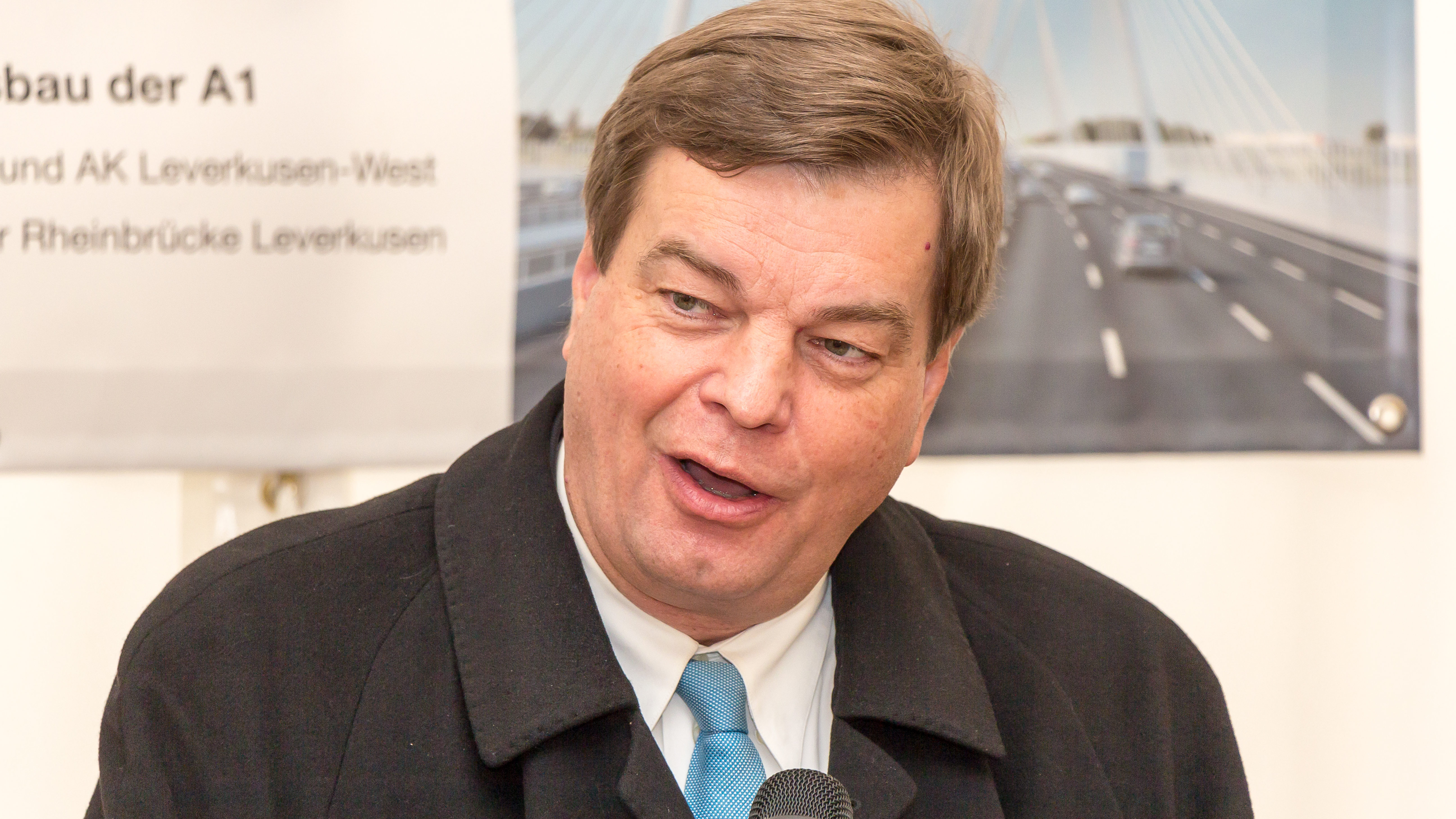 Spatenstich zum Neubau der Leverkusener Rheinbrücke Foto: Ansprache von Enak Ferlemann, Parlamentarischer Staatssekretär beim Bundesverkehrsministerium